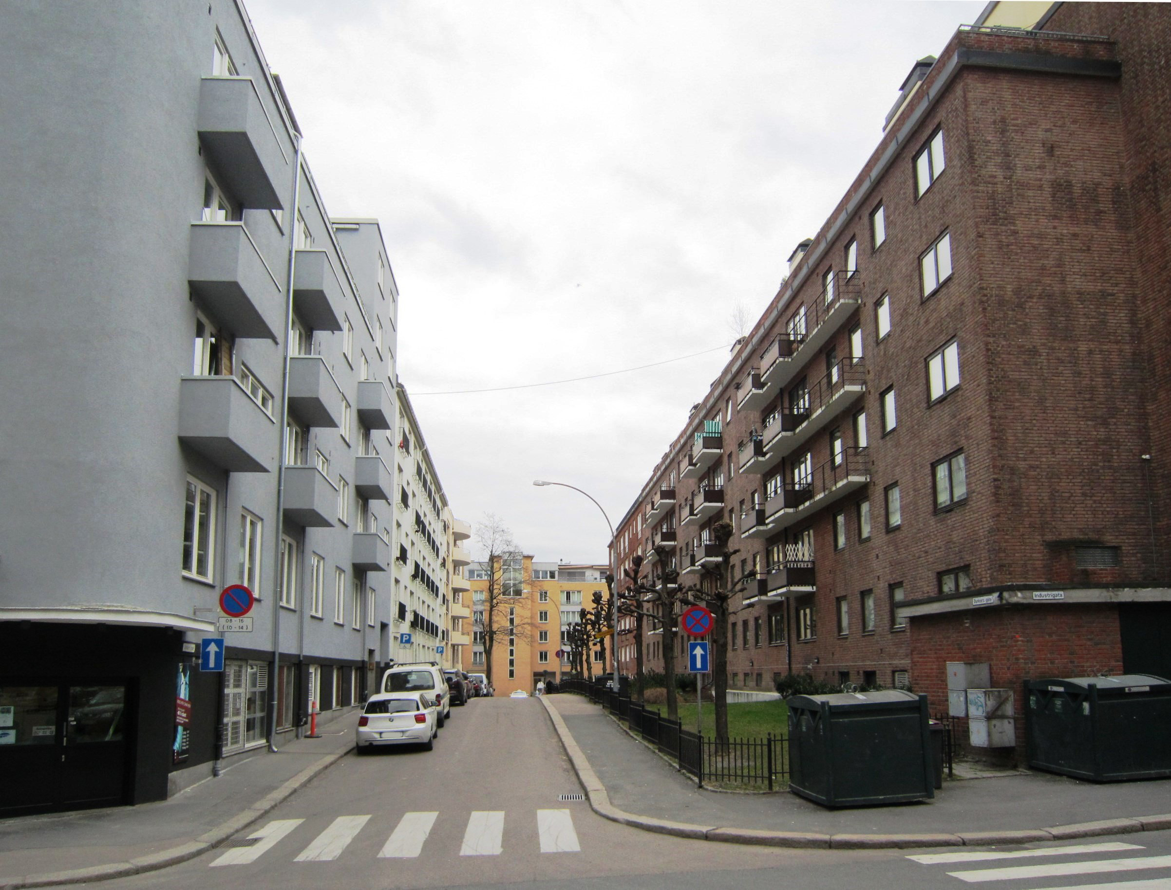 Dunkers gate på Majorstuen sett fra Industrigata